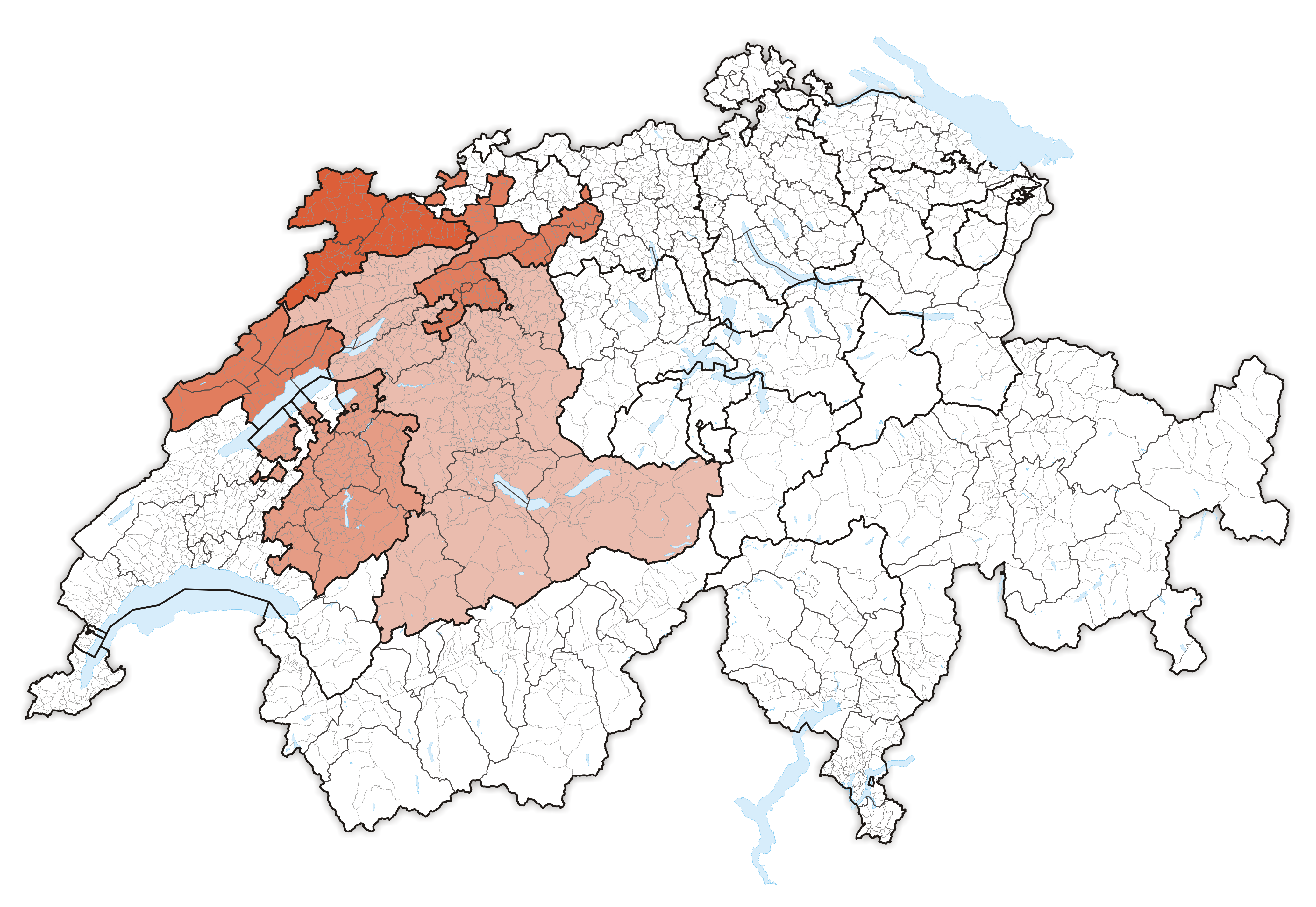 Large regions in Switzerland